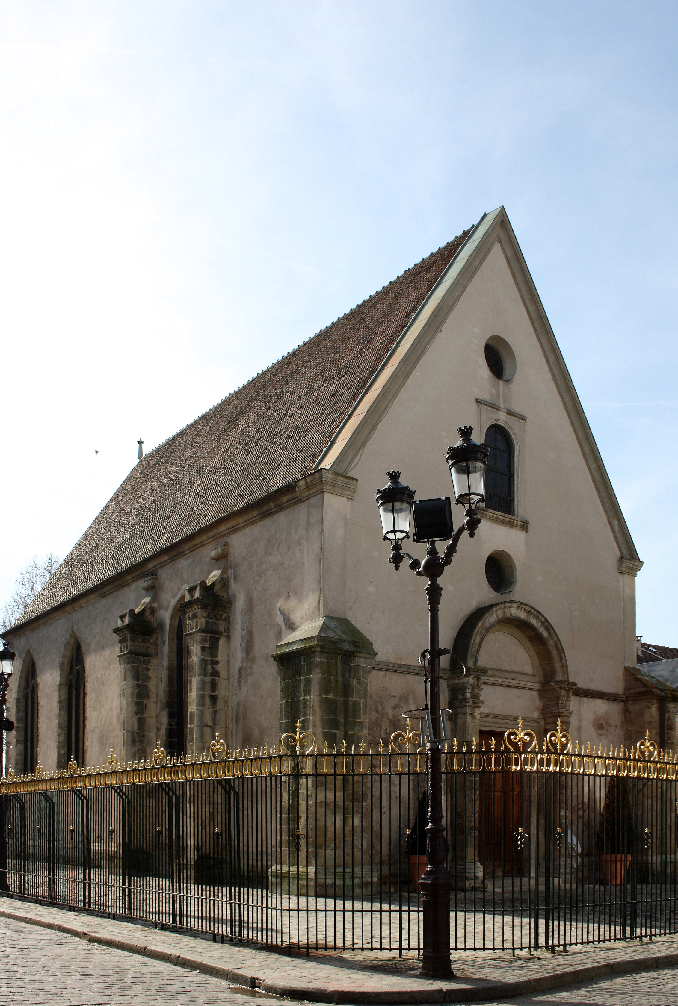 Katholische Kirche Notre-Dame-de-Pitié (Vieille Église) in Puteaux, einer Gemeinde im Département Hauts-de-Seine (Île-de-France), aus dem 16. Jahrhundert, Eingangsfassade